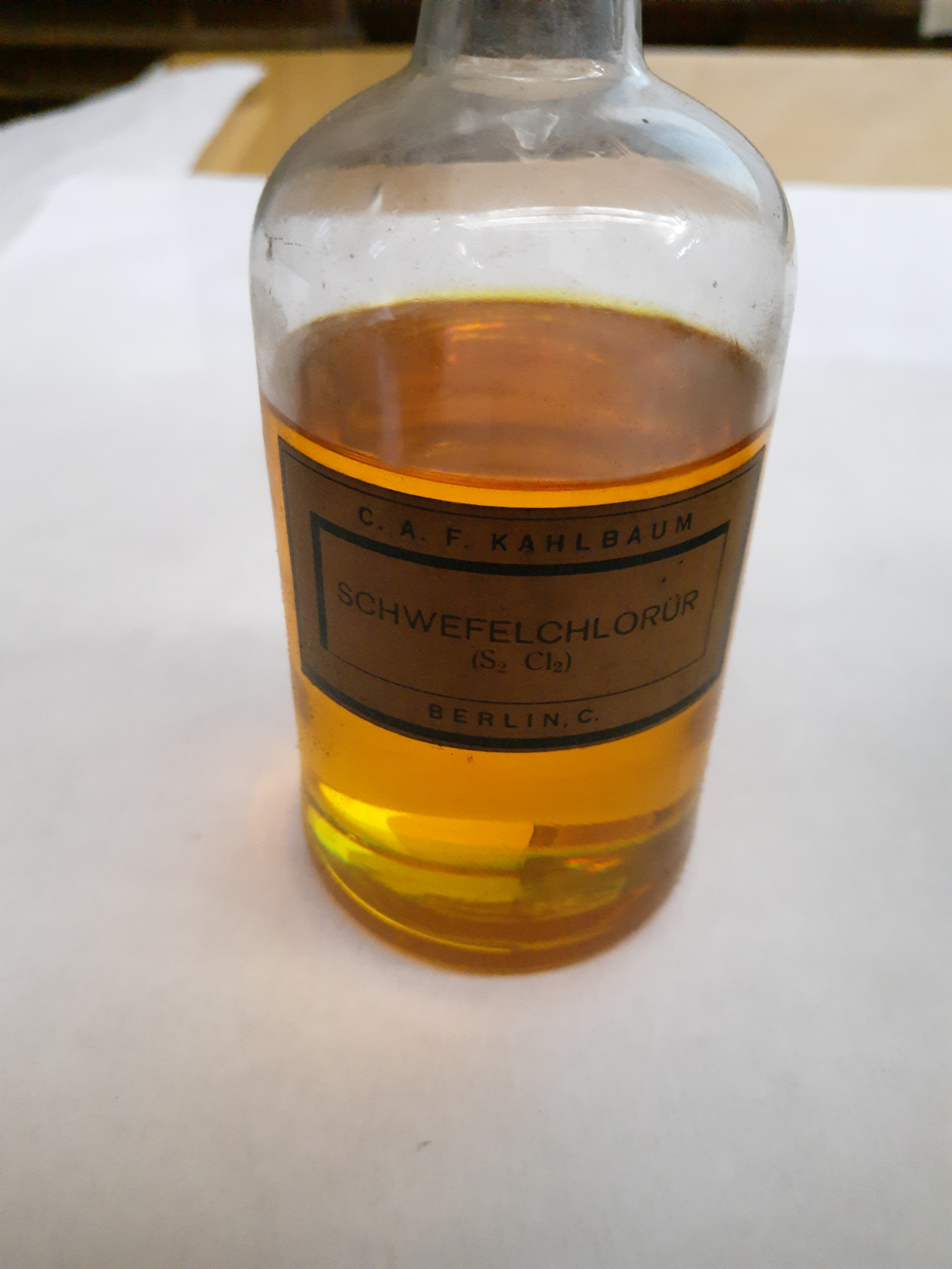 Жидкий дитиодихлорид, химическое соединение